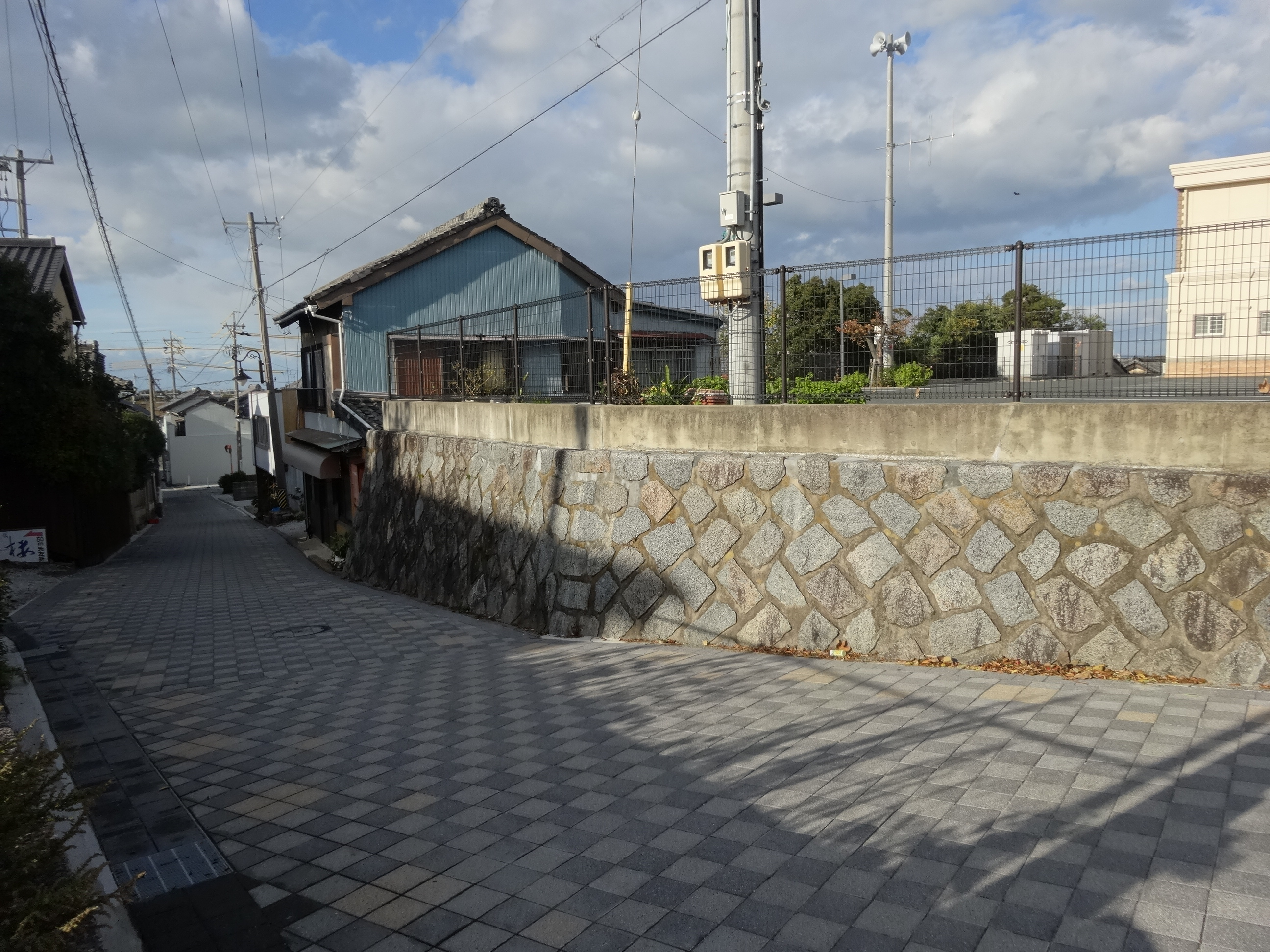 田原市福江町にある通称城坂と呼ばれる道。畠村陣屋から畠湊へ出る下り坂に位置することからその名がついたといわれる。